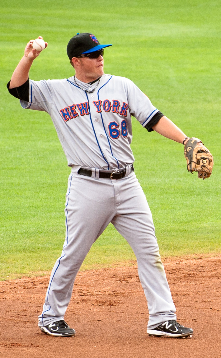 Brad Emaus